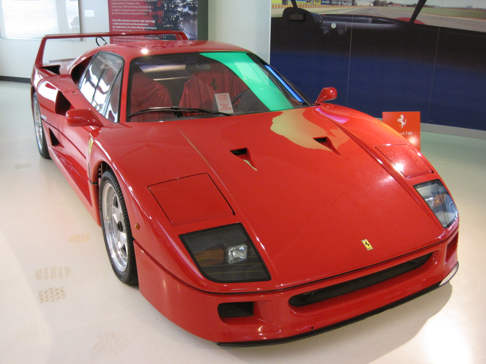 Automobiles in the Galleria Ferrari - Ferrari F40 V8 - 1987